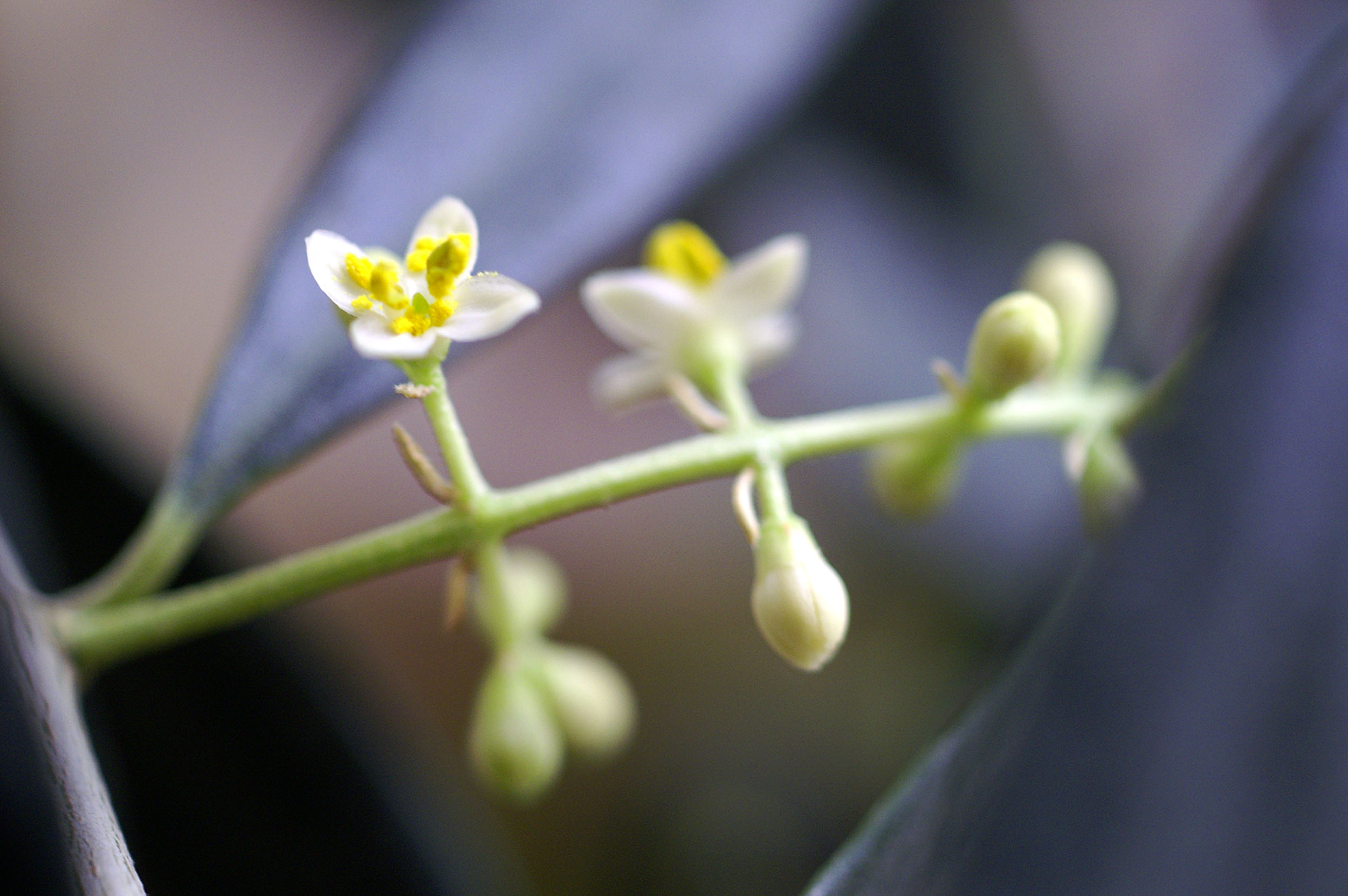 blüte eines olivenbaums - blühender olivenbaum flower - dud of an olive tree